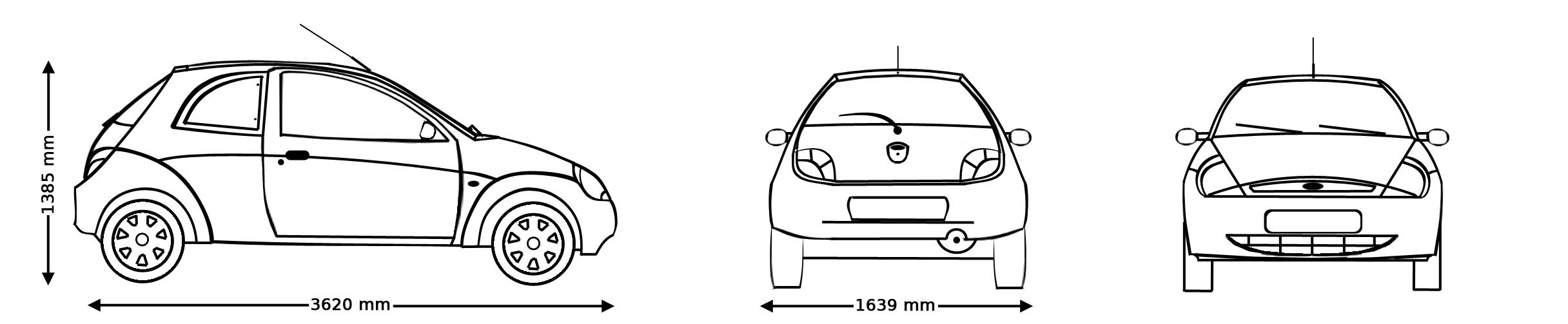 Blueprint eines 2004'er Ford Ka (Schematische Zeichnung)